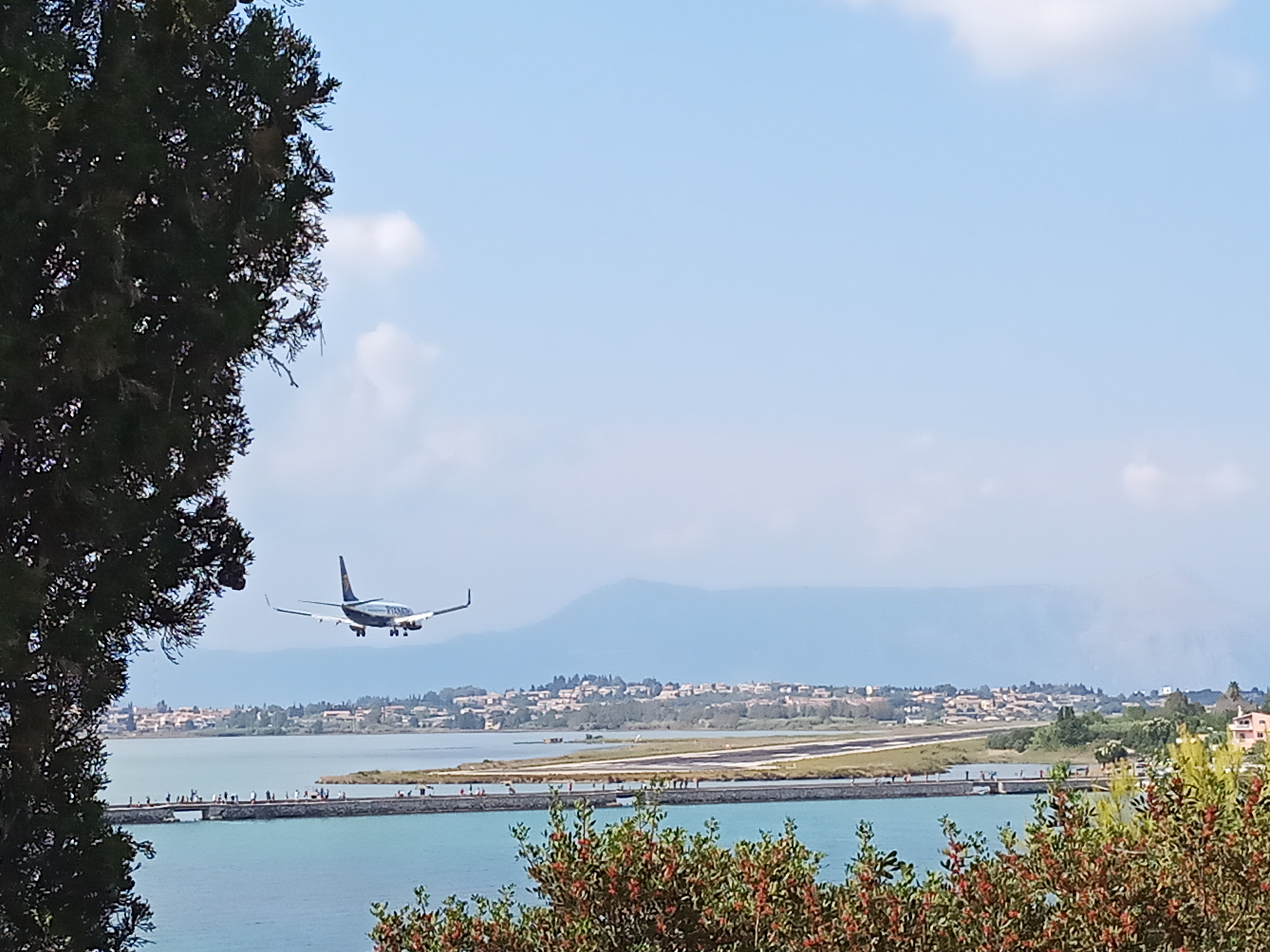 Злітна смуга аеропорту Керкіри. Фото зроблене на острові Понтіконісі